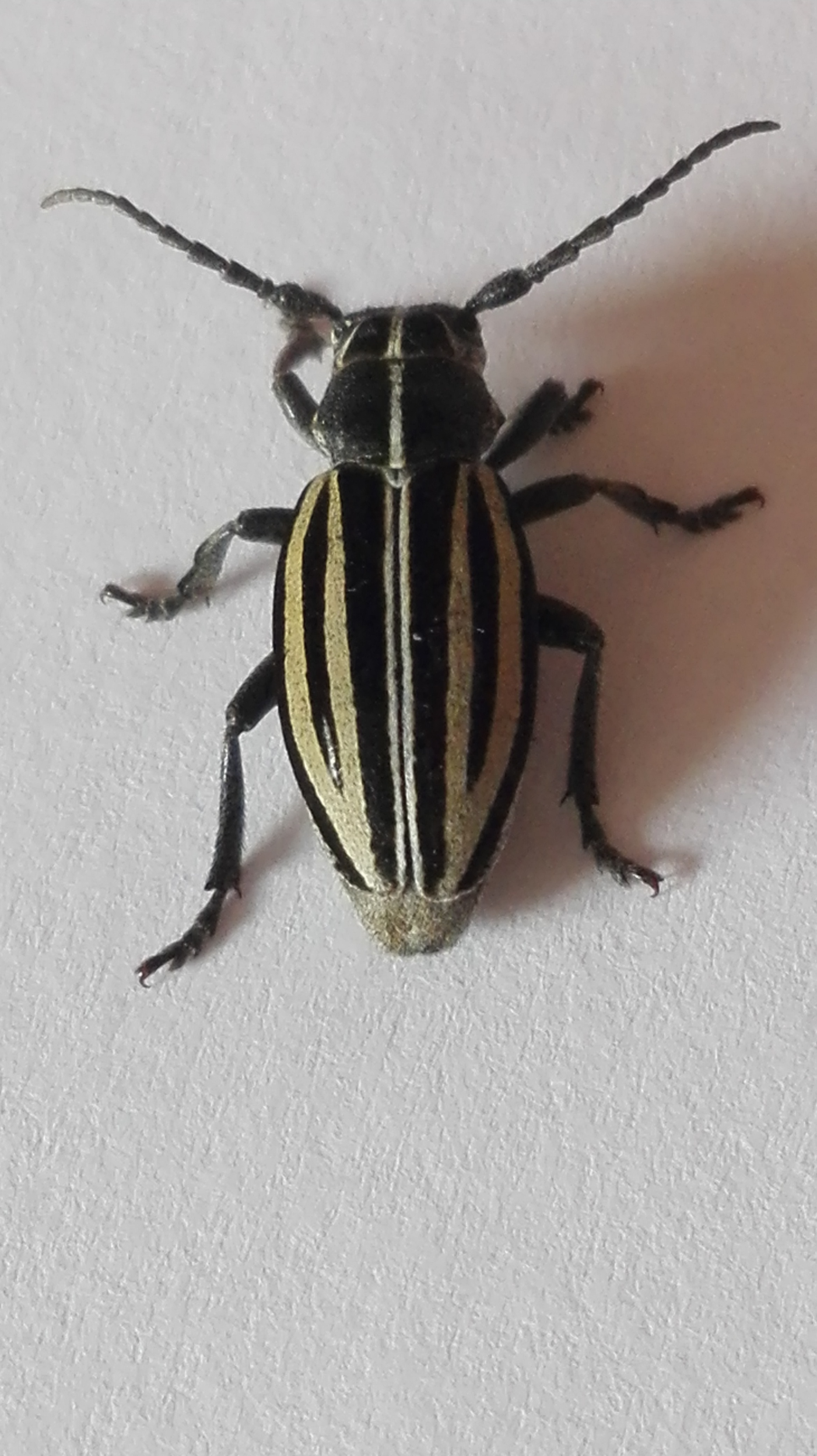 Dorcadion scopolii